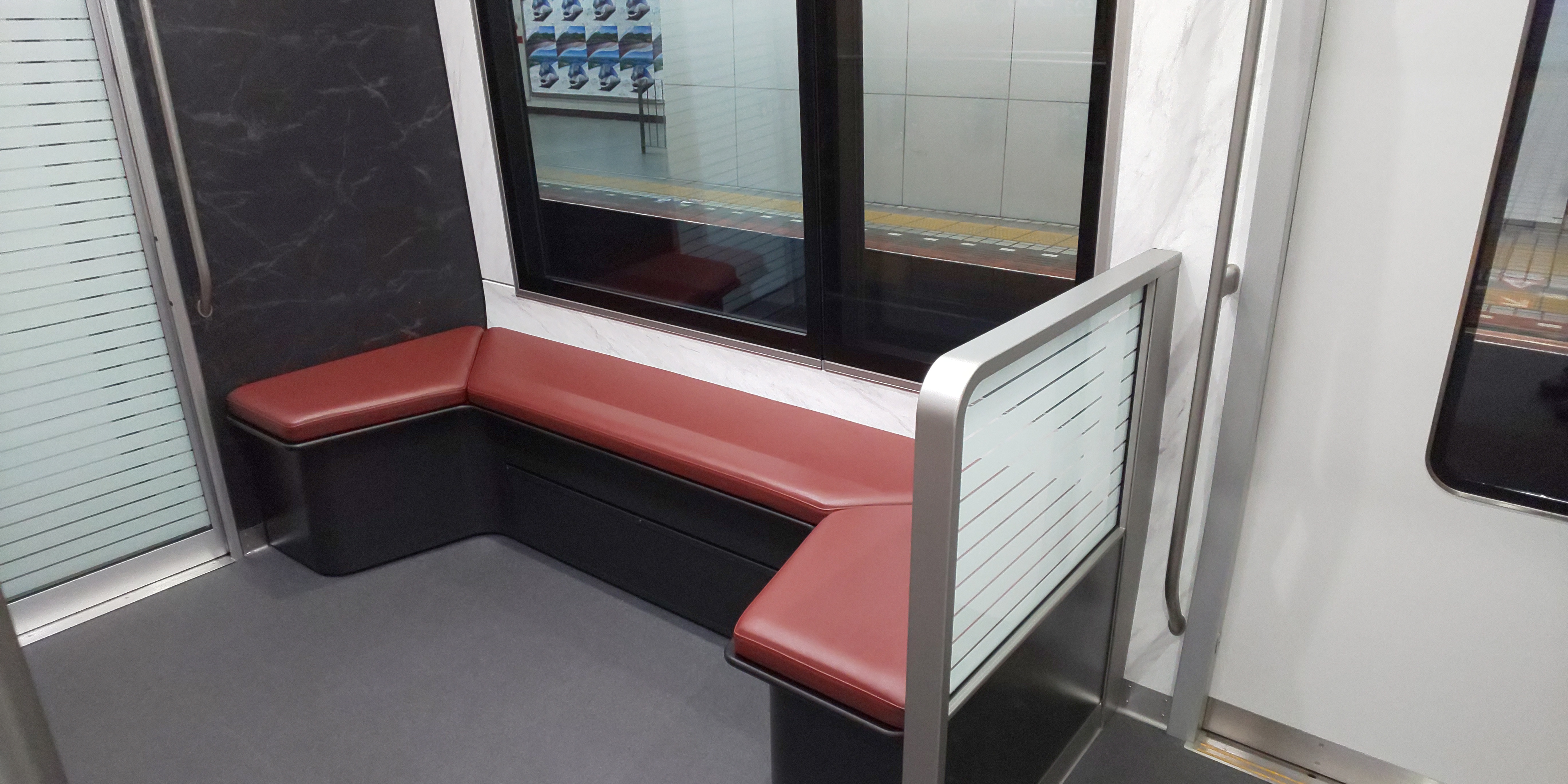 近鉄80000系電車の車端部に設けられたベンチ 大阪難波駅で撮影